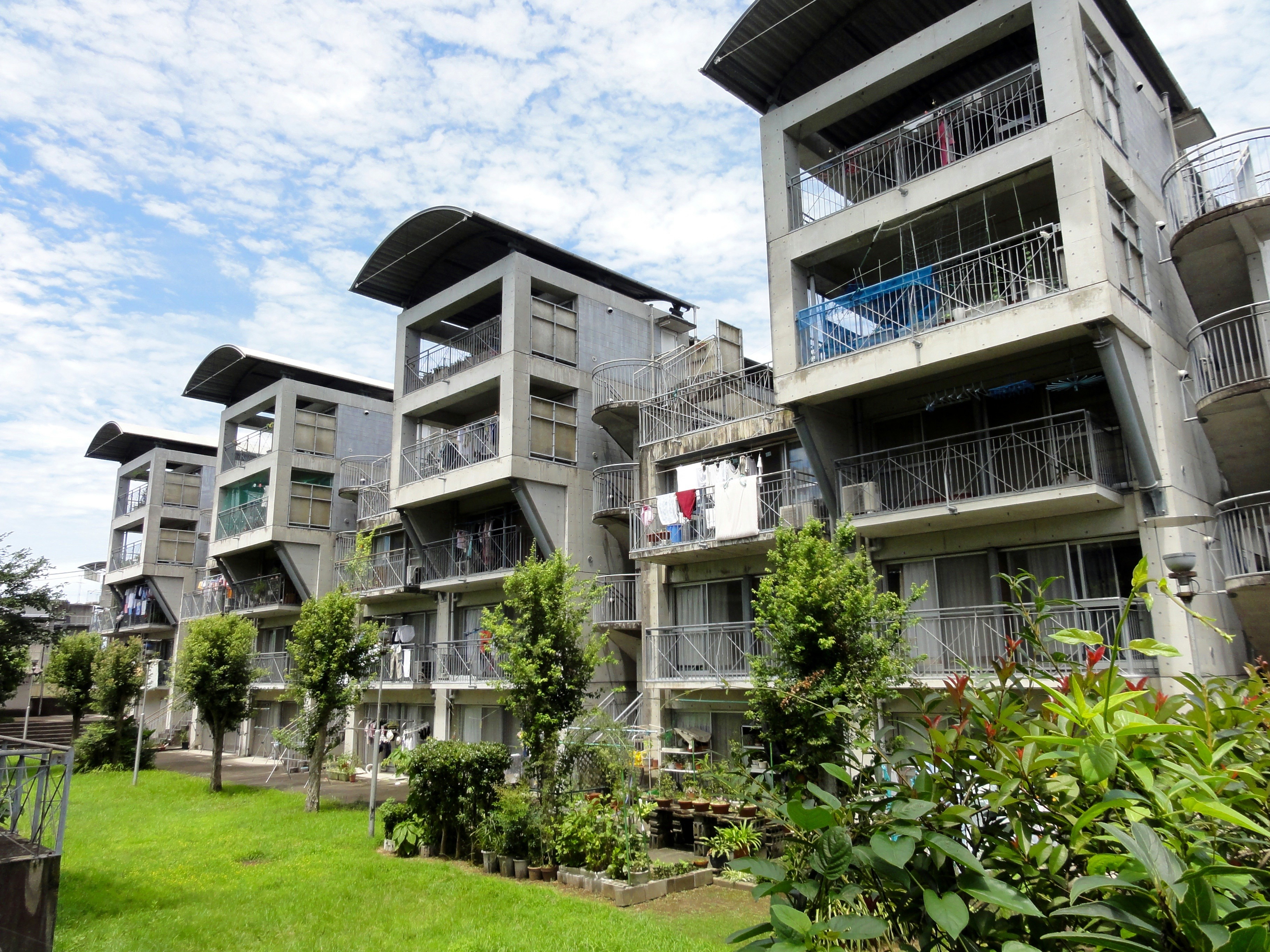 熊本県営保田窪第一団地 住居棟を中庭側より望む